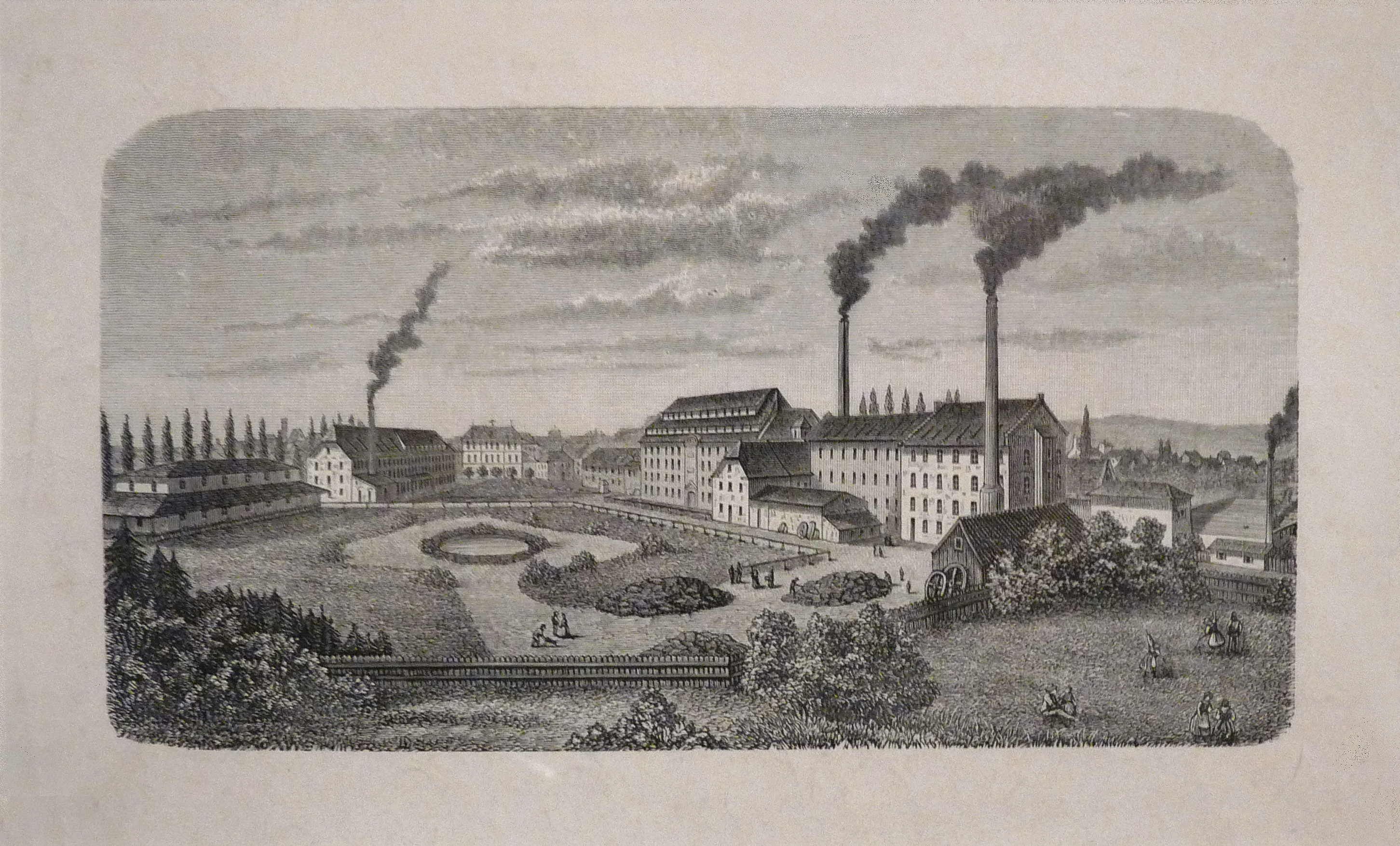 Mulhouse, Vue cavalière de la Dentsche, gravure en taille douce, 1860 (Musée de l'impression sur étoffes)